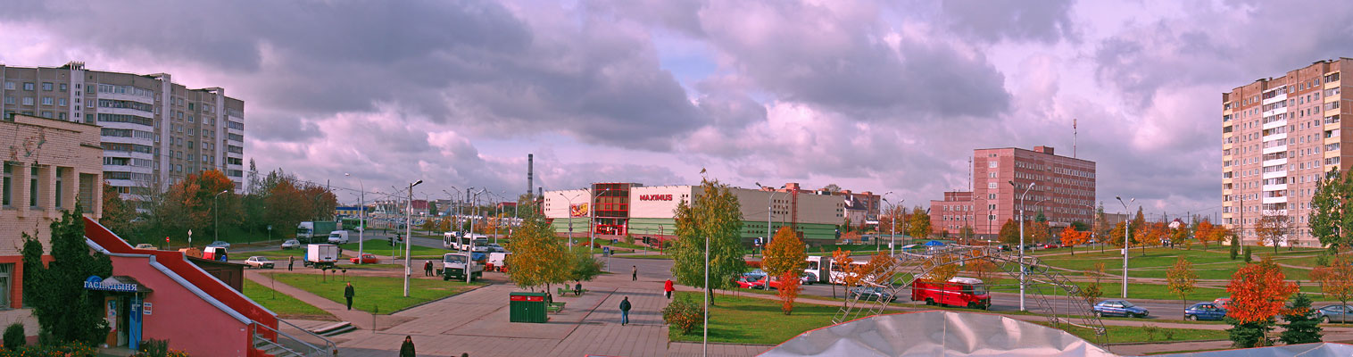 Crossroad of Nieścierava & Hierasimienki st. = Скрыжаваньне вуліц Несьцерава і Герасіменкі